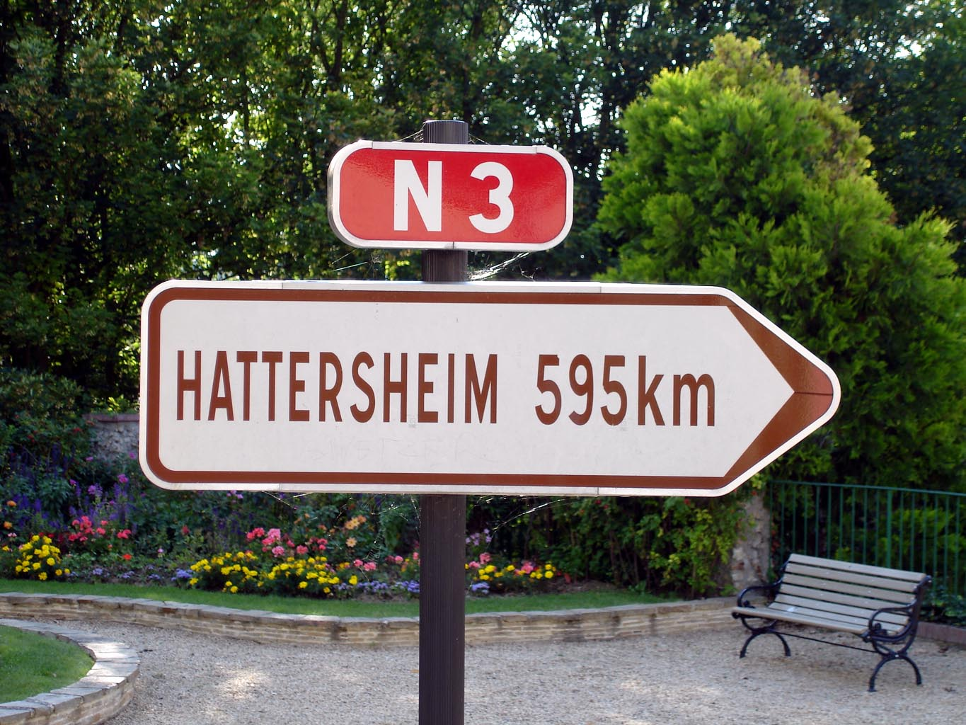 Panneau square d Hattersheim à Sarcelles (Val-d'Oise), France